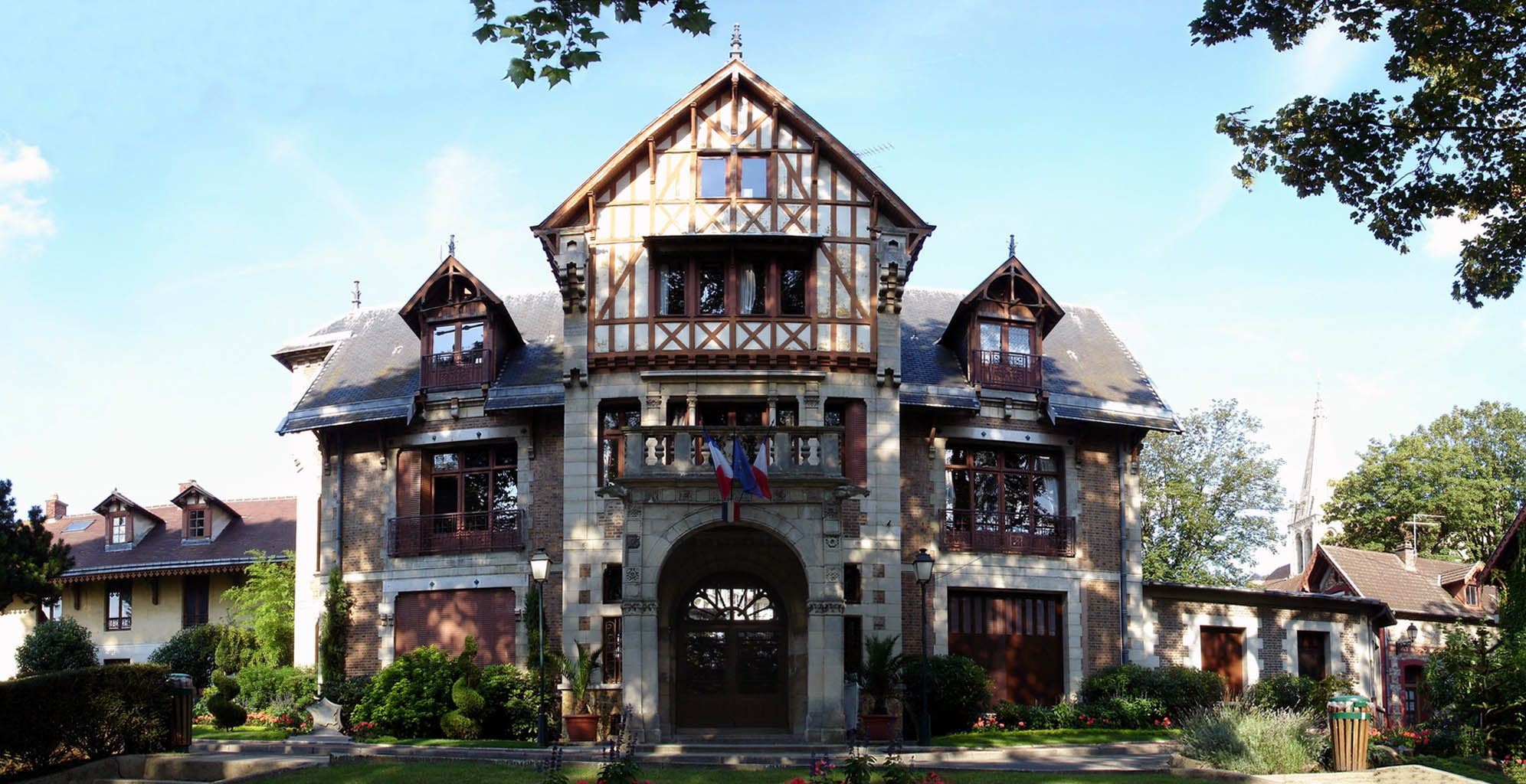 L'hôtel de ville de Sarcelles (Val-d'Oise), France